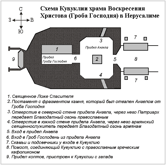 Схема Кувуклии храма Воскресения Христова (Гроба Господня) в Иерусалиме